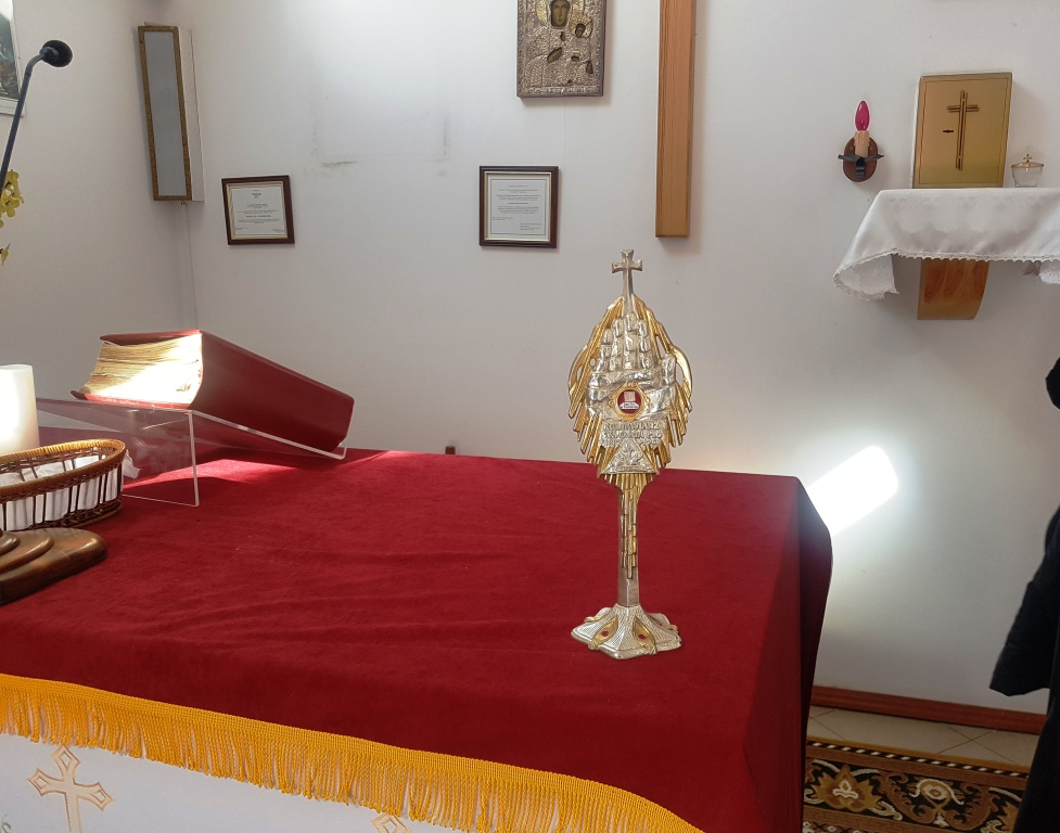 Relikwie Ojca Pio kaplica, Narusa, 2018